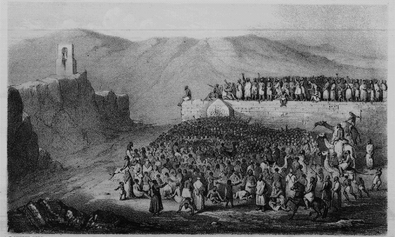 Illustration